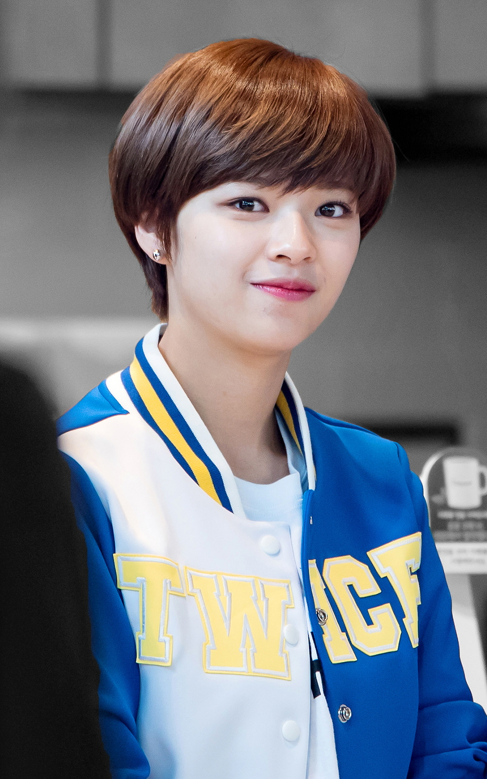 [16.04.28] 트와이스 던킨도너츠 강남본점 치얼업 콤보 이벤트